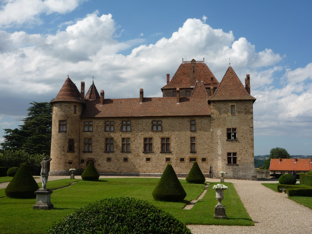 Façade sud du château des XIV-XVème siècle